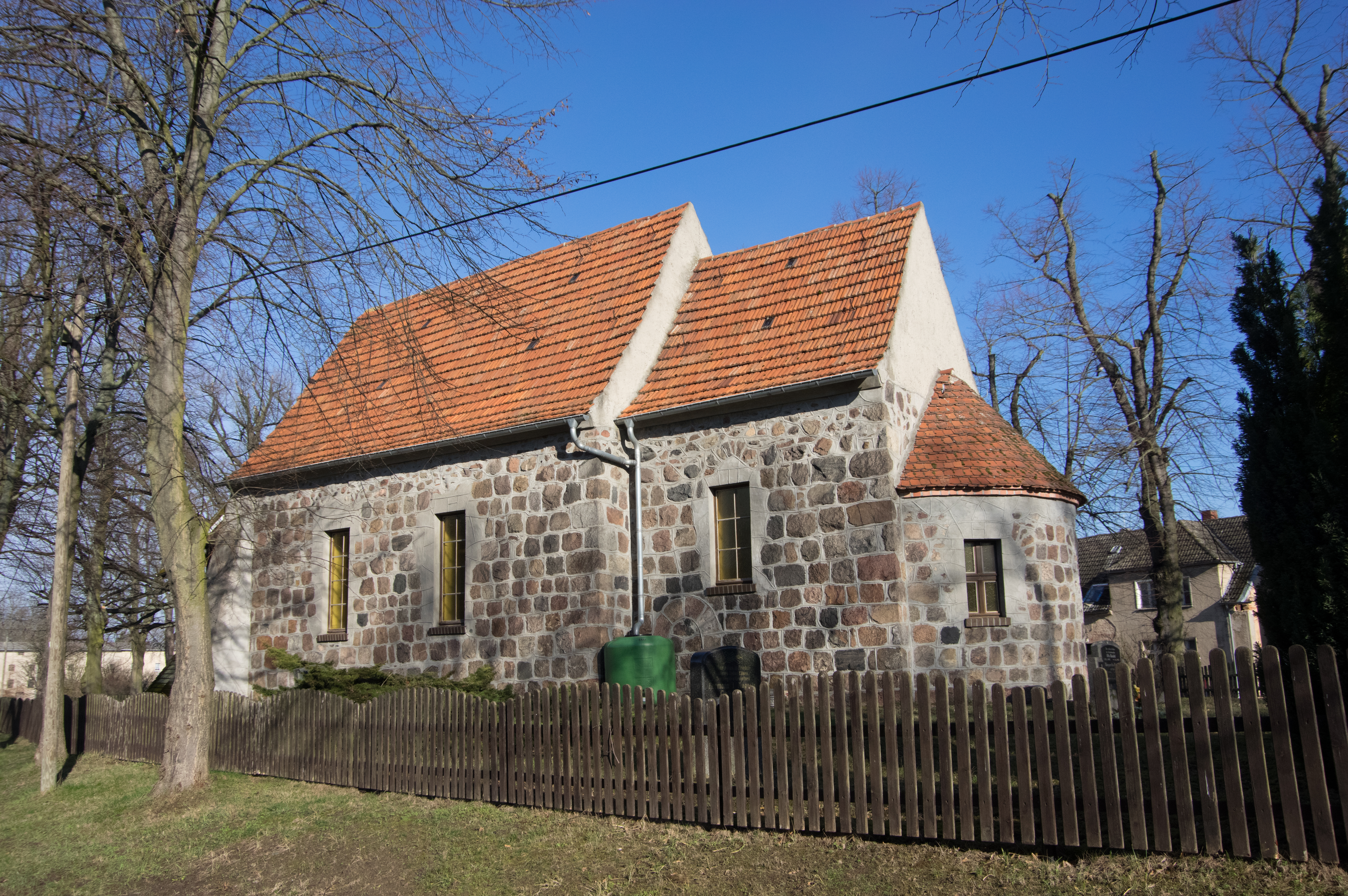 Dahme/Mark, Ortsteil Niebendorf in Brandenburg. Die Dorfkirche steht unter Denkmalschutz.